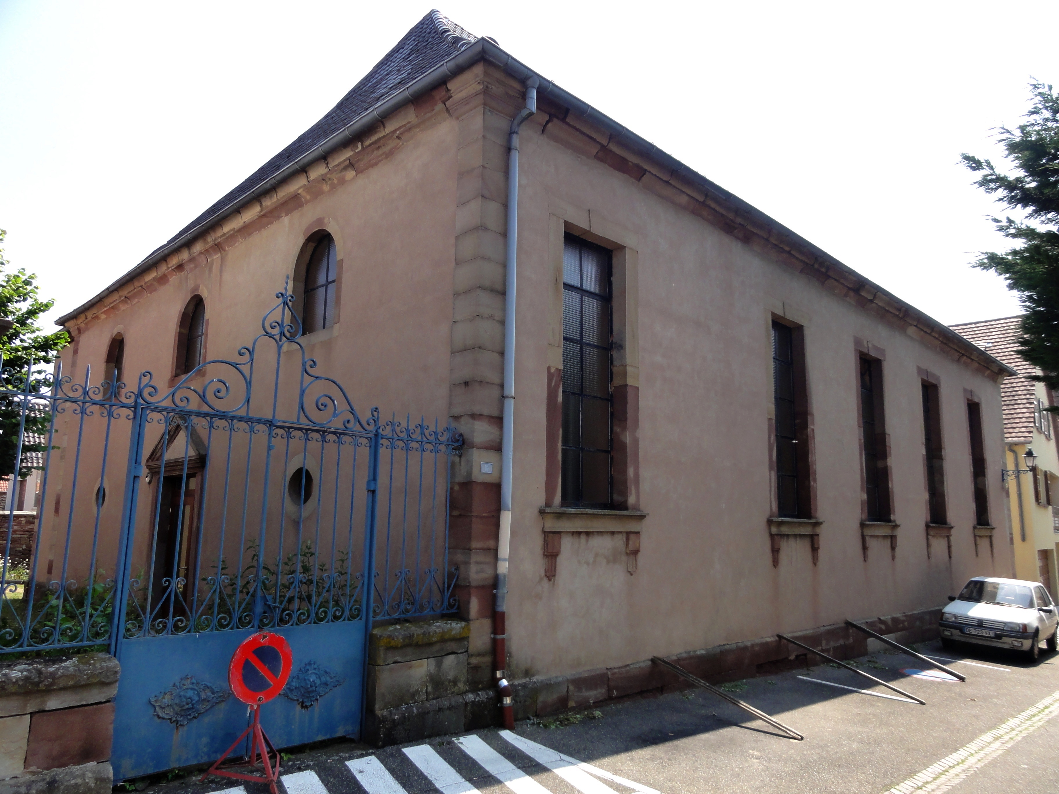 Alsace, Bas-Rhin, Marmoutier, Synagogue (1821), 11 rue du Plan.